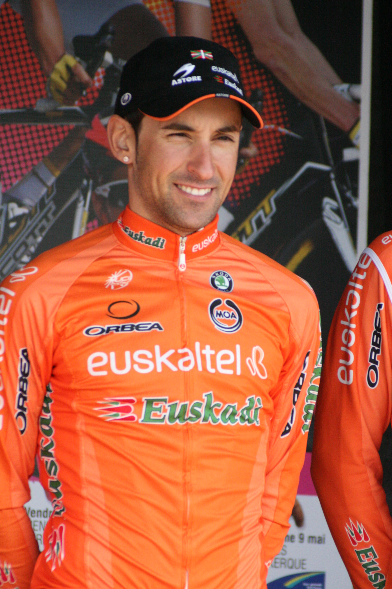 Daniel Sesma lors de la présentation des équipes des 4 jours de Dunkerque